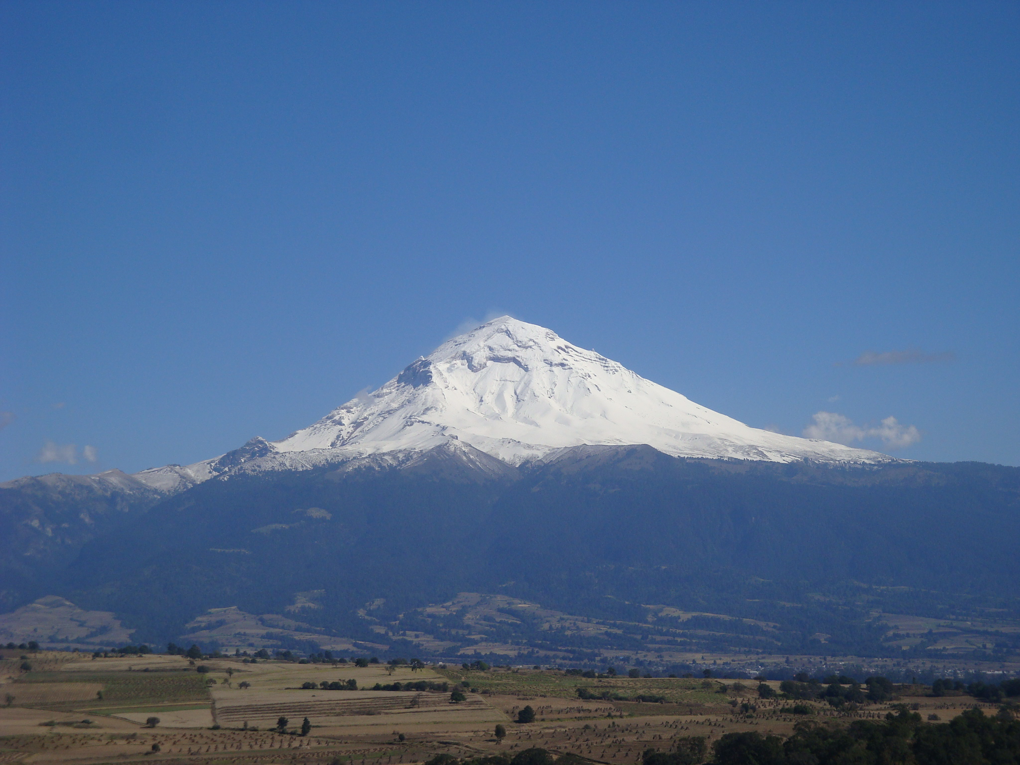 Vista del volcan Popocatepetl desde el panteón de Cuijingo